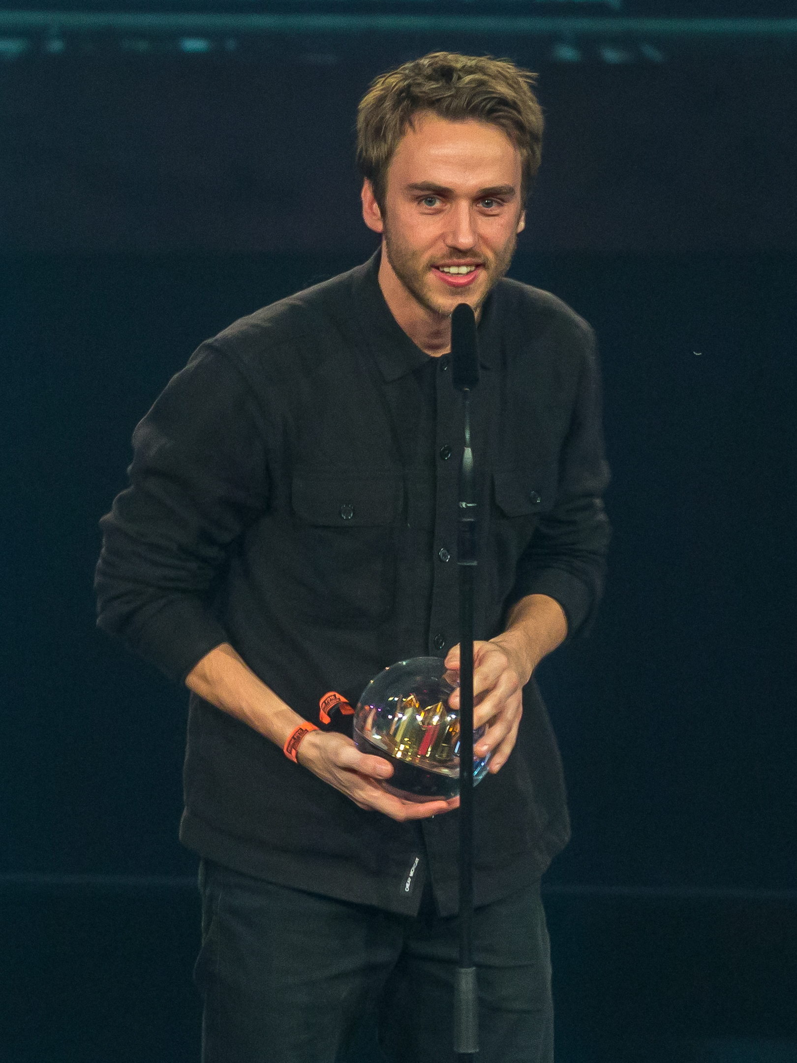 1LIVE Krone 2016 - 2015 - Show - Bester Künstler: Clueso